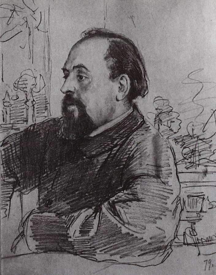 Портрет С.И.Мамонтова. 1879